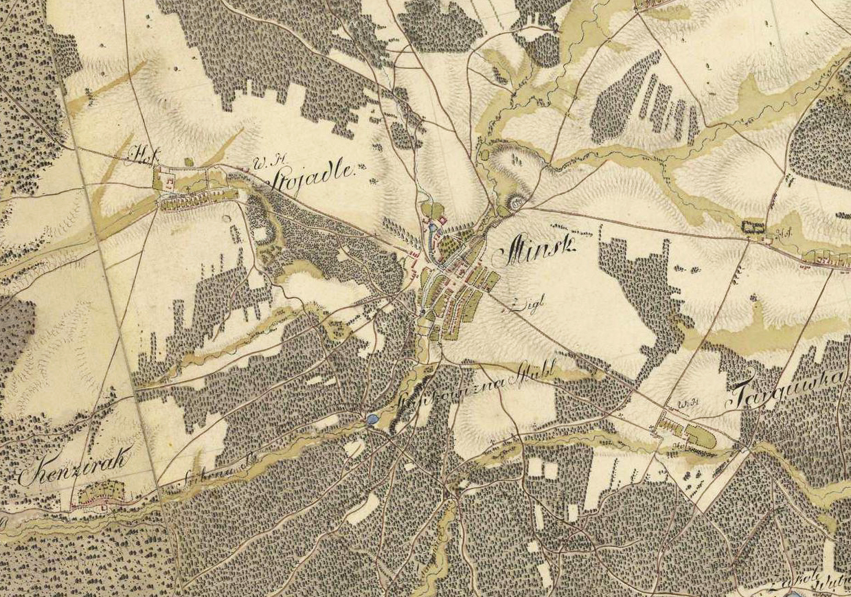 Minsk ok 1801-1804, First Military Surway